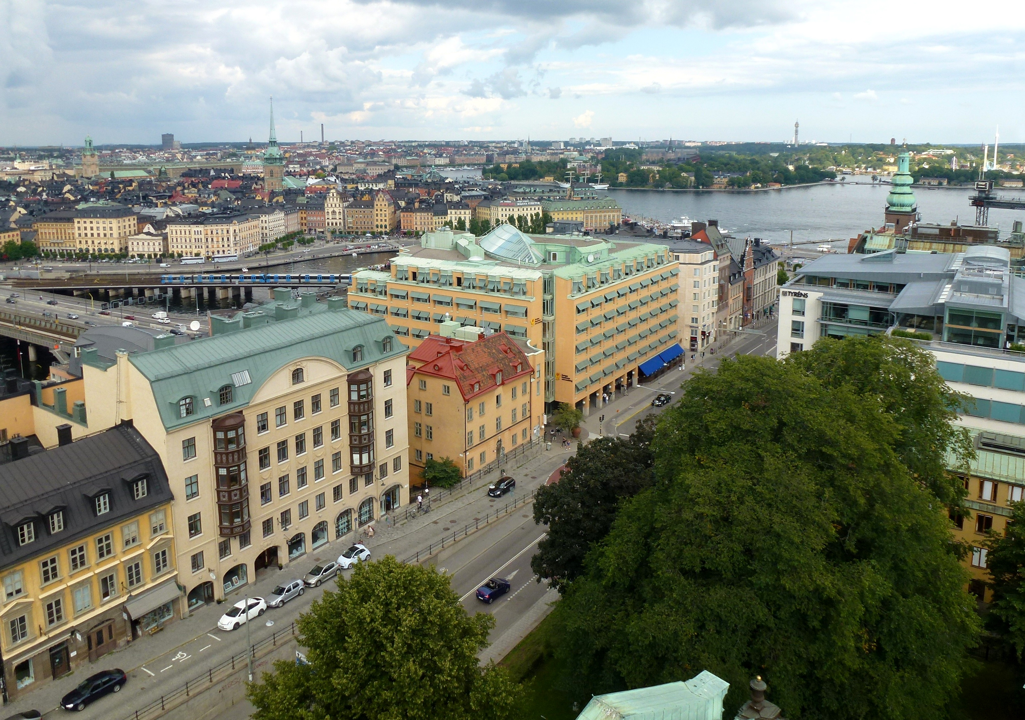 Hornsgatans östra del från Mariakyrkans torn